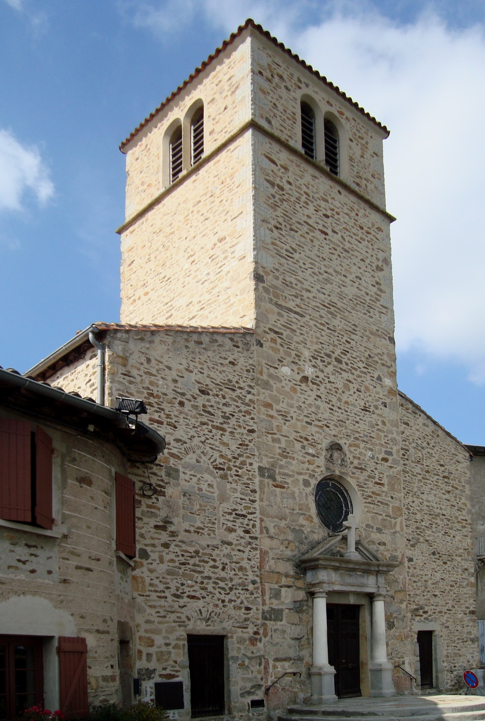 Église de la Conversion-de-Saint-Paul, Riverie, Rhône, France.